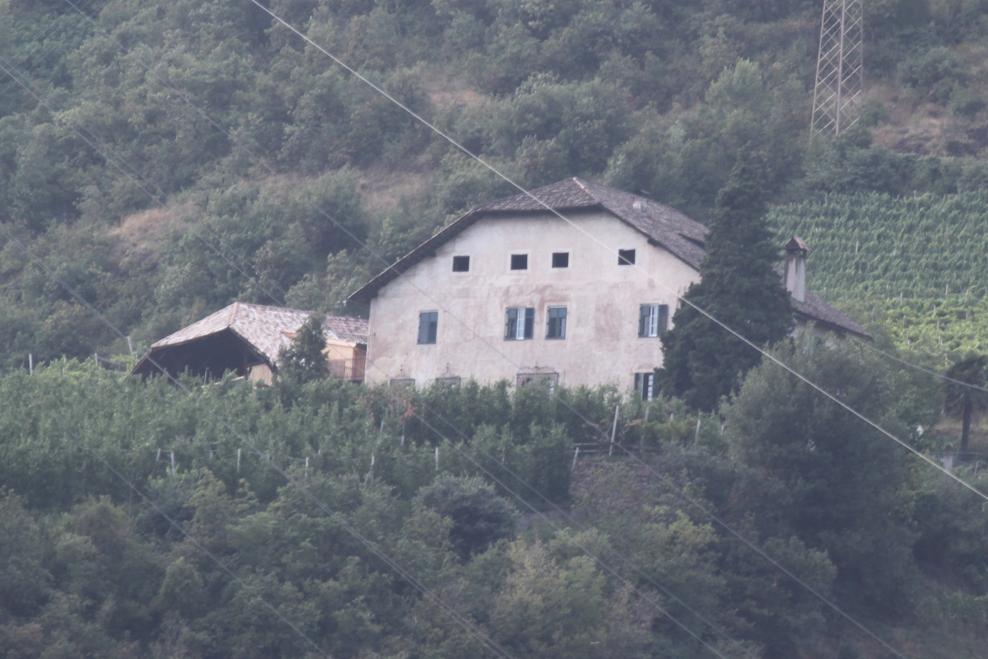 Kofler auf Ceslar bei Bozen (Südtirol)